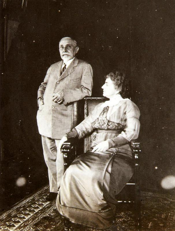 Raymundo de Castro Maya e sua esposa D. Theodósia, pais de Raymundo Ottoni de Castro Maya. Fotografia de autor desconhecido. Data desconhecida (fim do século XIX). Acervo dos Museus Castro Maya.